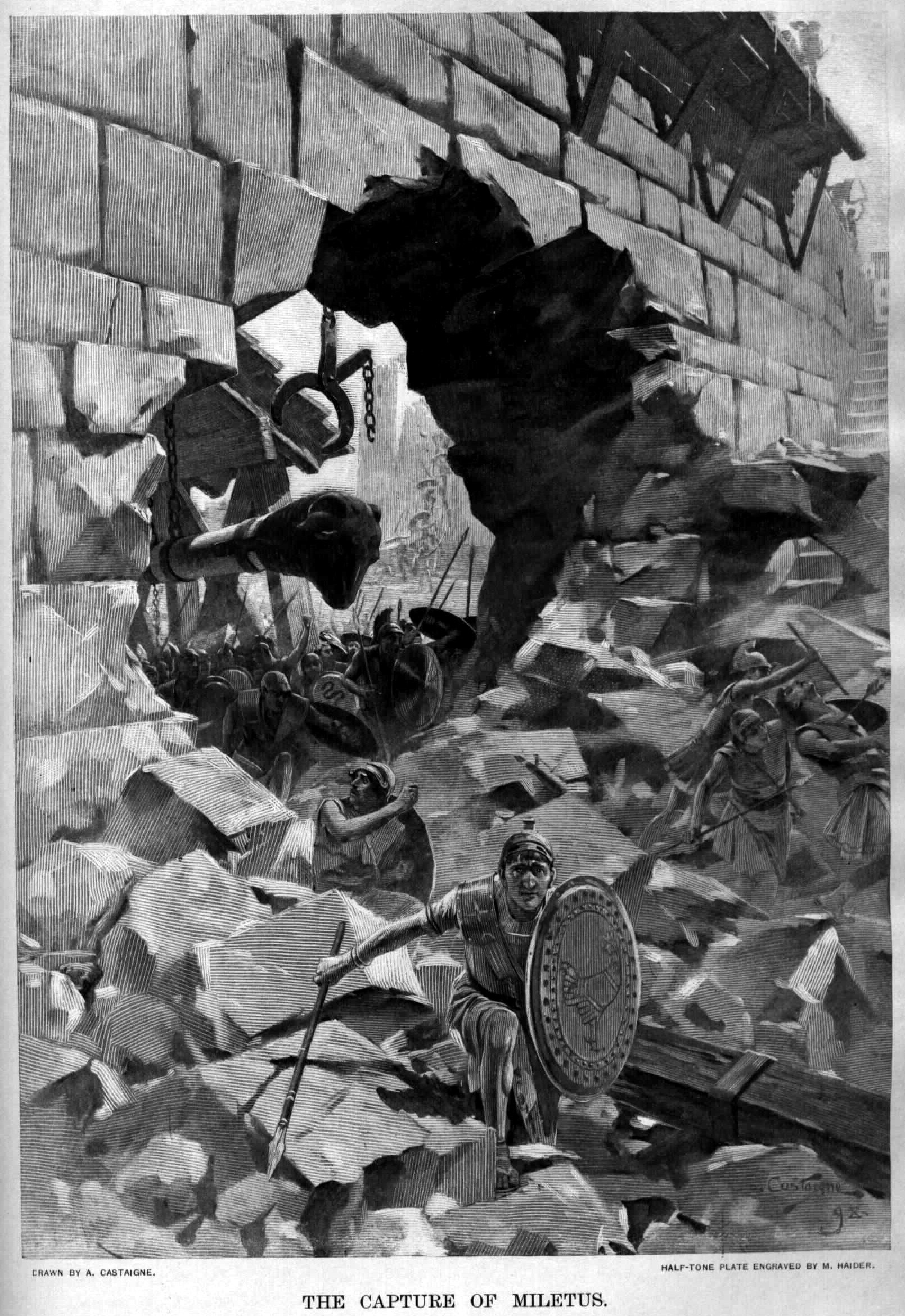 Alexander old drawings